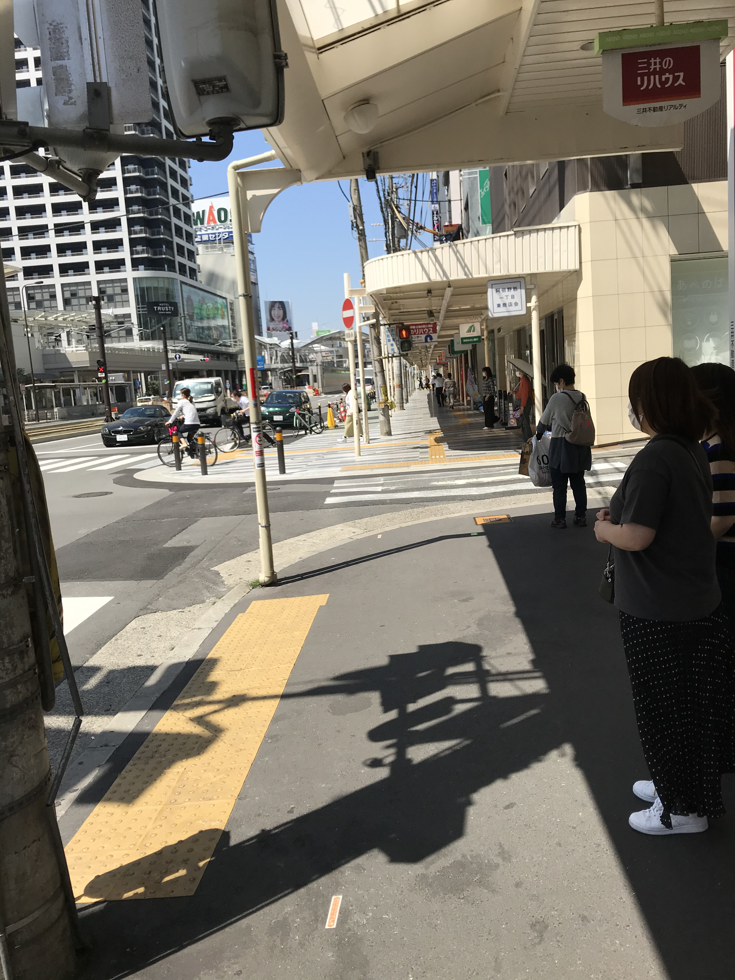 あべの筋1丁目の南行の歩道が広がったことが分かる。屋根より大きく出ている。（阿倍野筋二丁目から撮影）